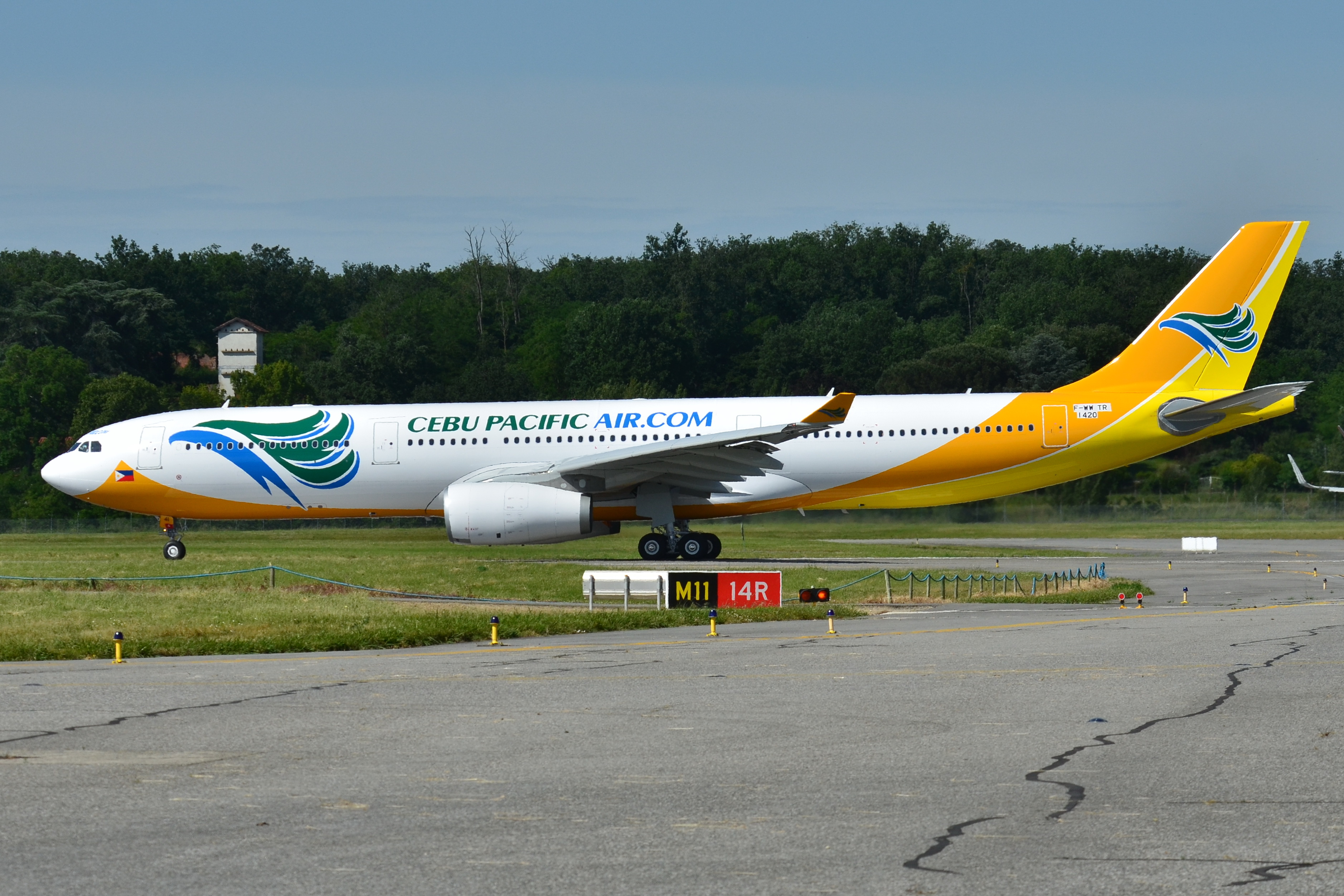 Photo prise à l'aéroport de Toulouse-Blagnac (LFBO) en France. Picture take at Toulouse-Blagnac Airport (LFBO) in France.